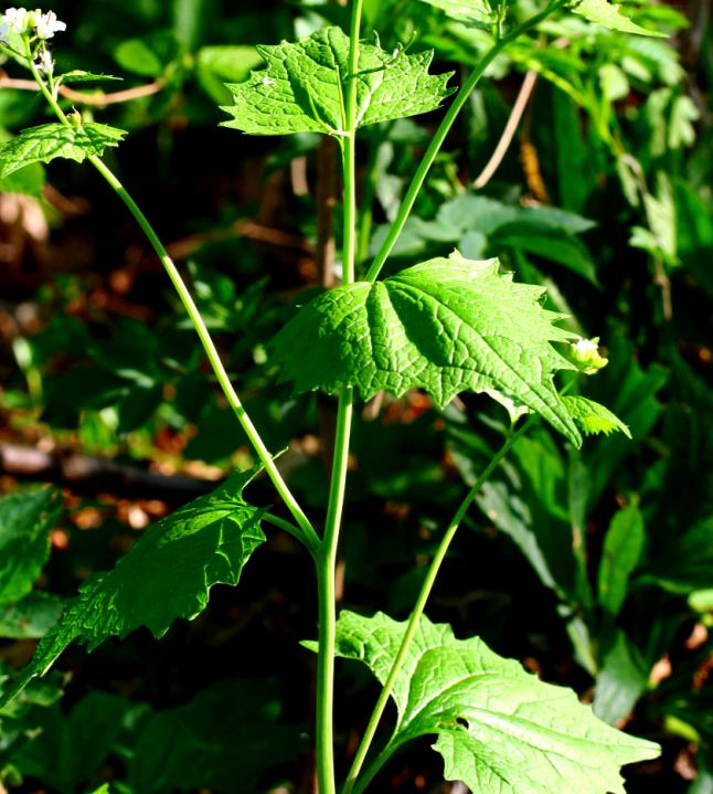 Alliaria petiolata